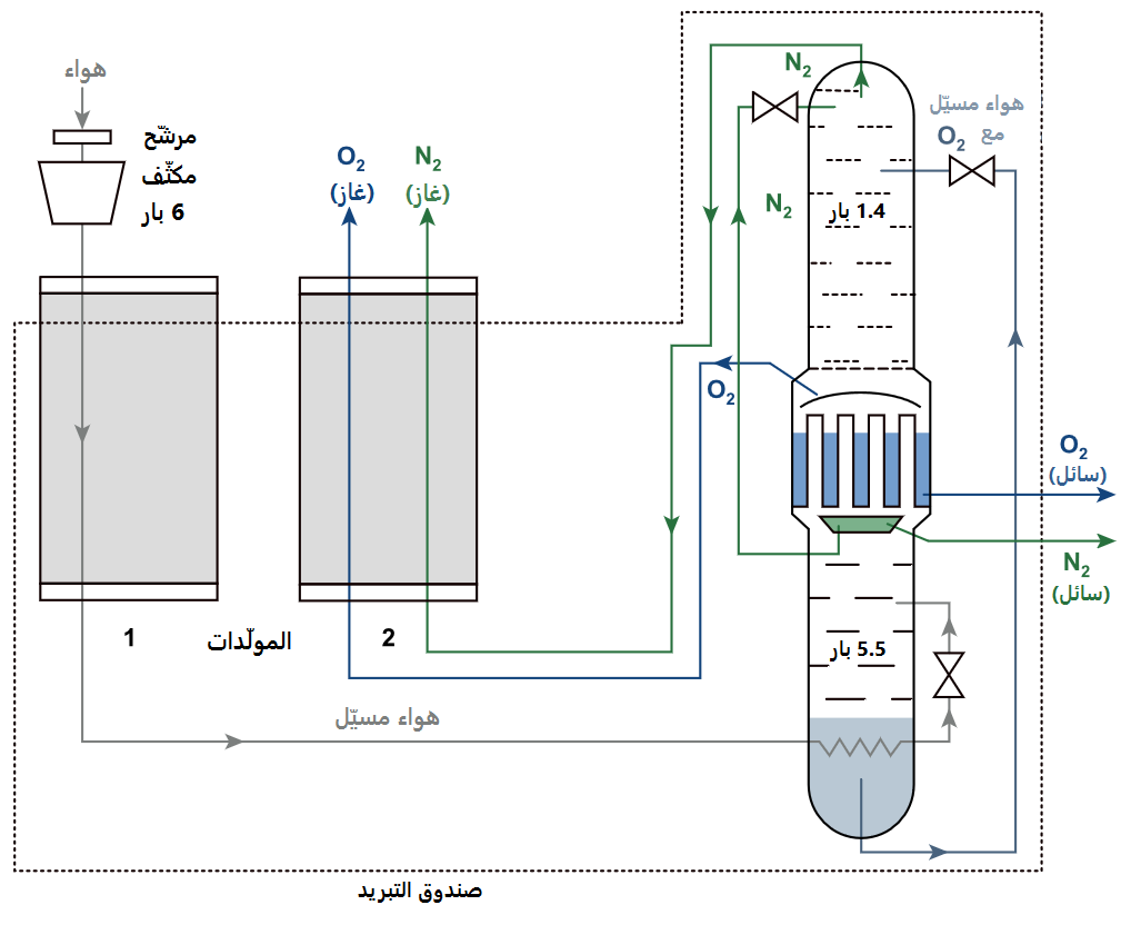 مخطط عملية ليندة ذات الضغط المخفف للحصول على الأكسجين